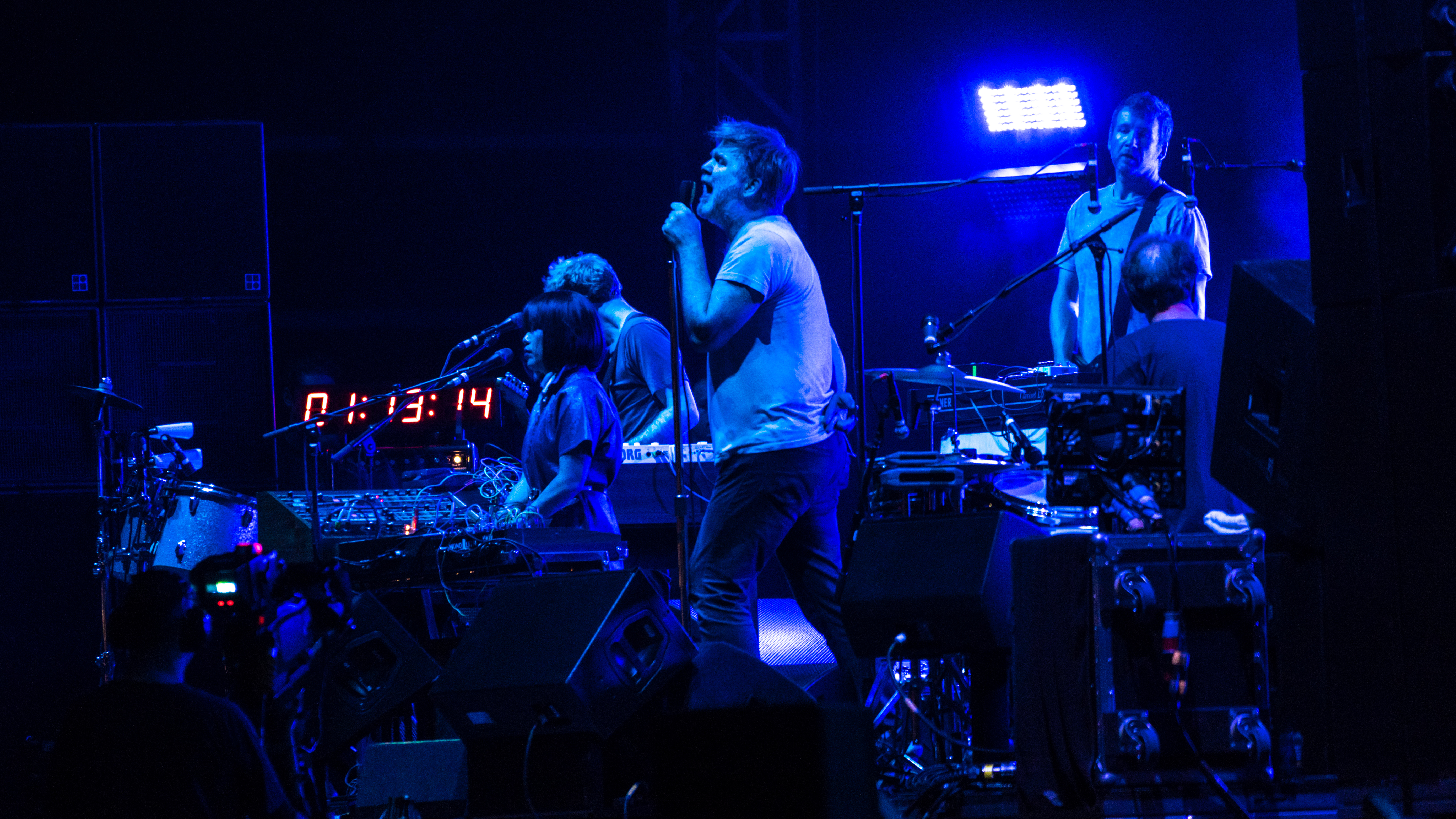 APEVicPark250518-130